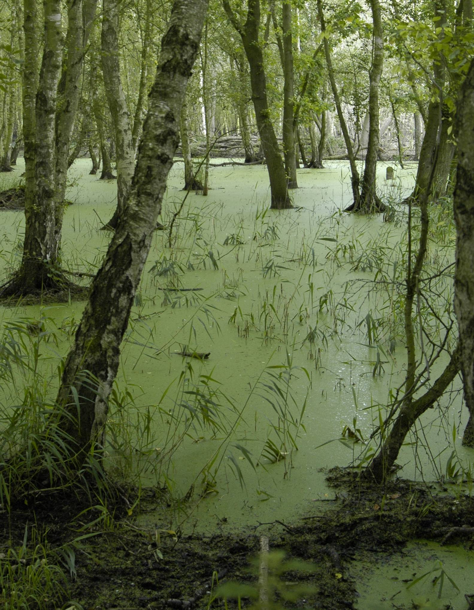 Bruchwald im Naturschutzgebiet Peenemünder Haken, Struck und Ruden